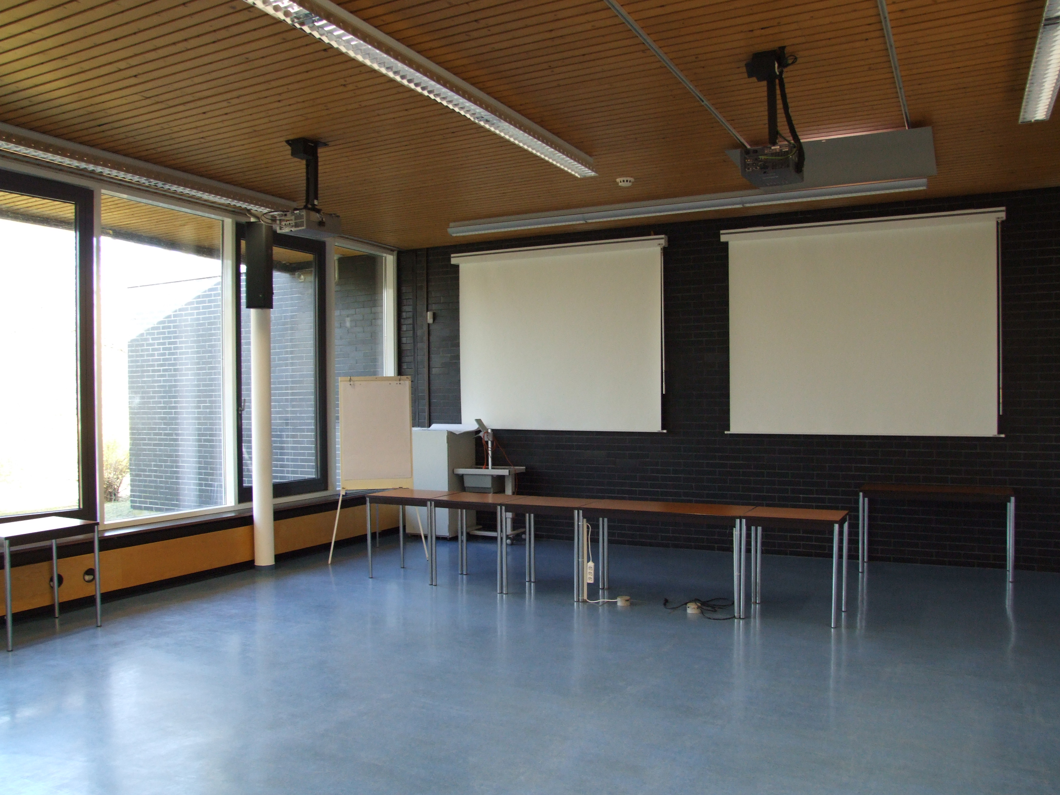 Universität Speyer, Freiherr-vom-Stein-Str. 2